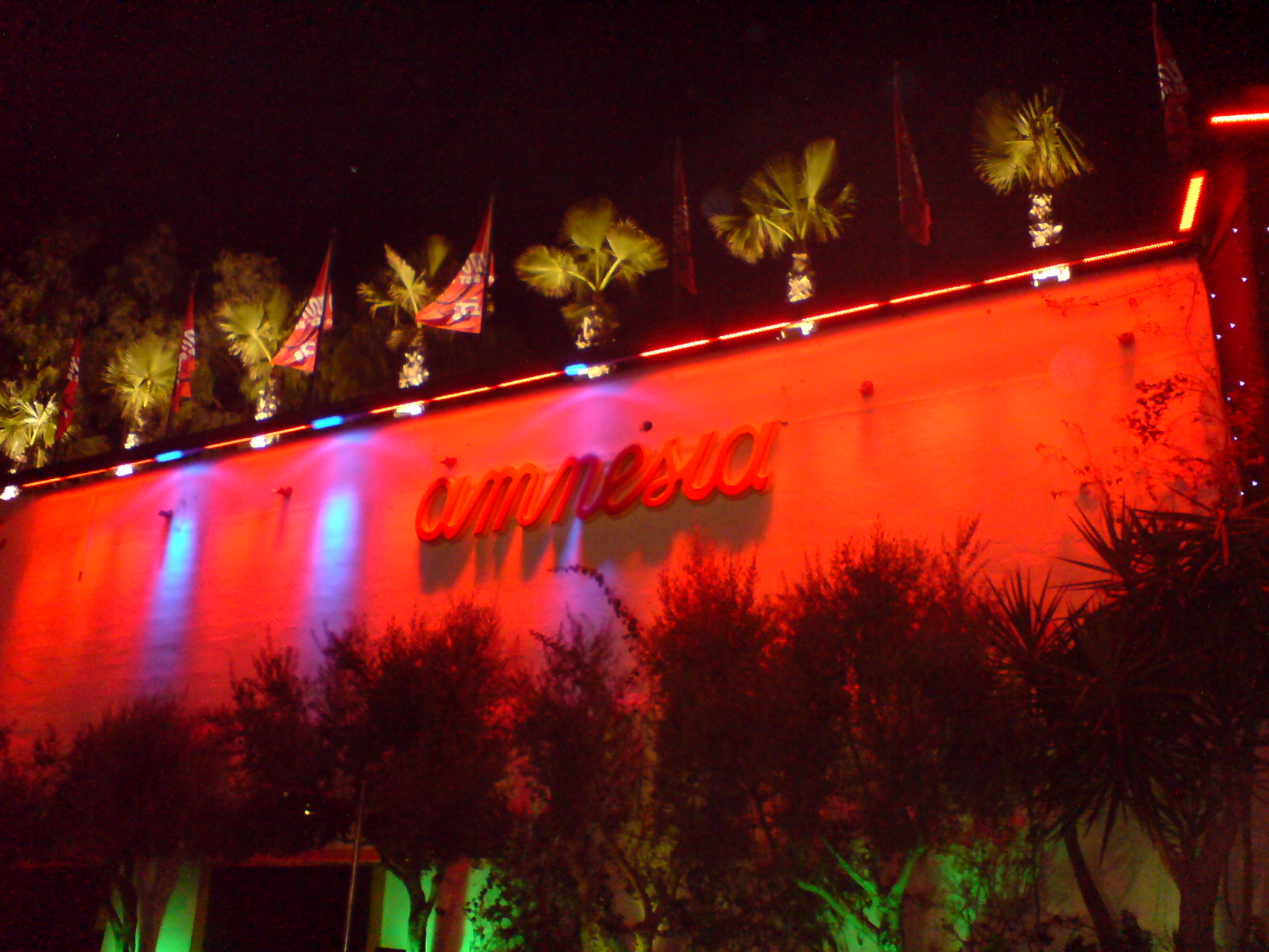 Amnesia Außenansicht